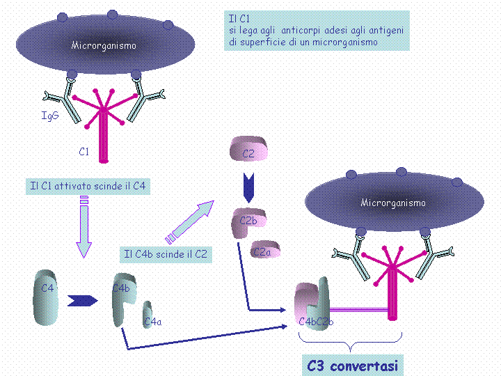 Descrizione: schema di formazione della C3 convertasi della via classica. Autore Giuseppe Tuttobene